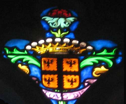 Ar Vinic'hi. Iliz. Ardamez Sant Erwan